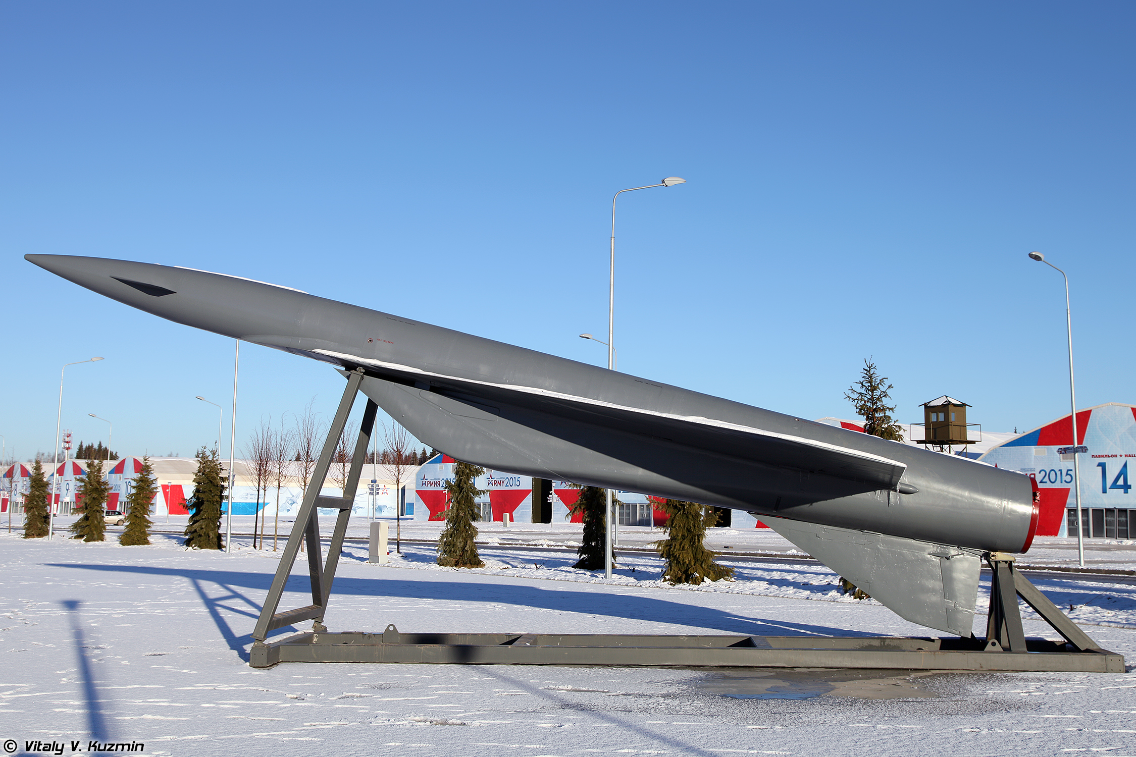 КР 3М25 Метеорит-А